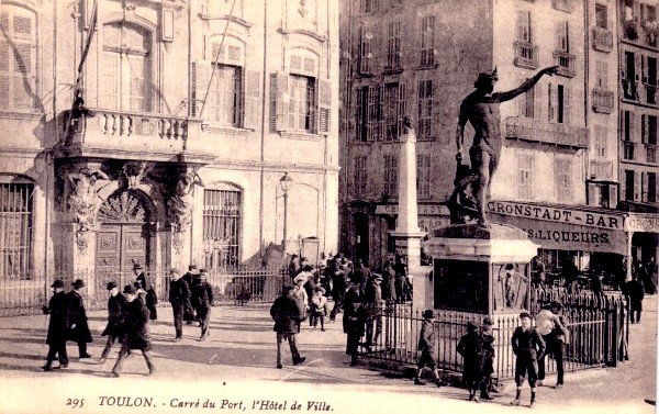 Cais Cronstadt, començament da segle XX